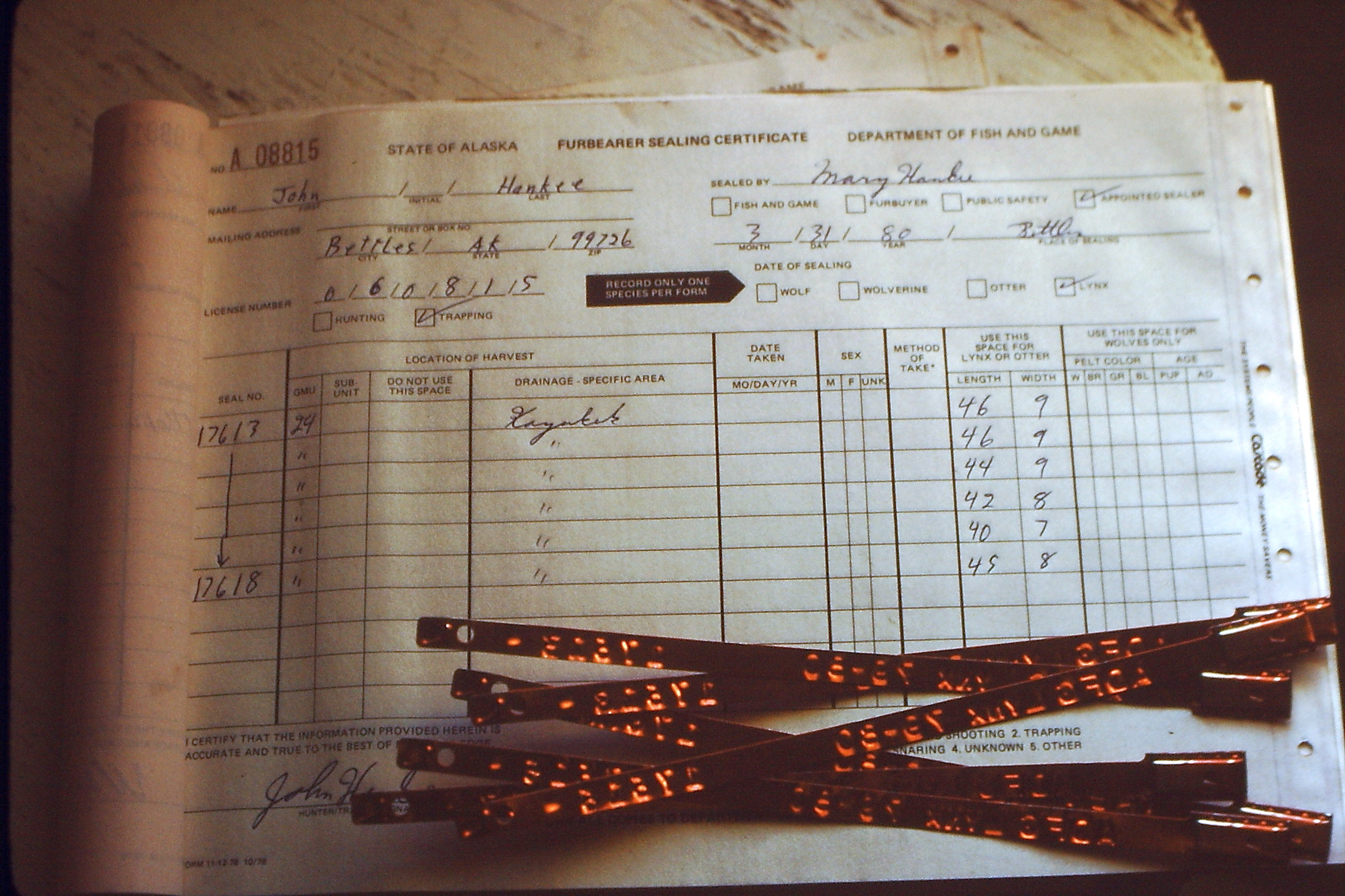 Alaska. Das Buch des Trappers für die Dokumentation seiner Fänge und die Metall-Label zum Kennzeichnen der Felle.